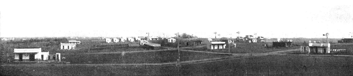 Panorámica de Villa Lugano, Buenos Aires, a dos años de su creación.